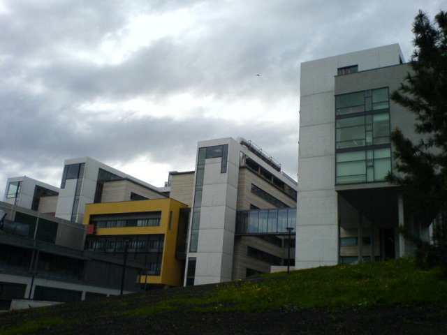 Realfag-bygget på NTNU.